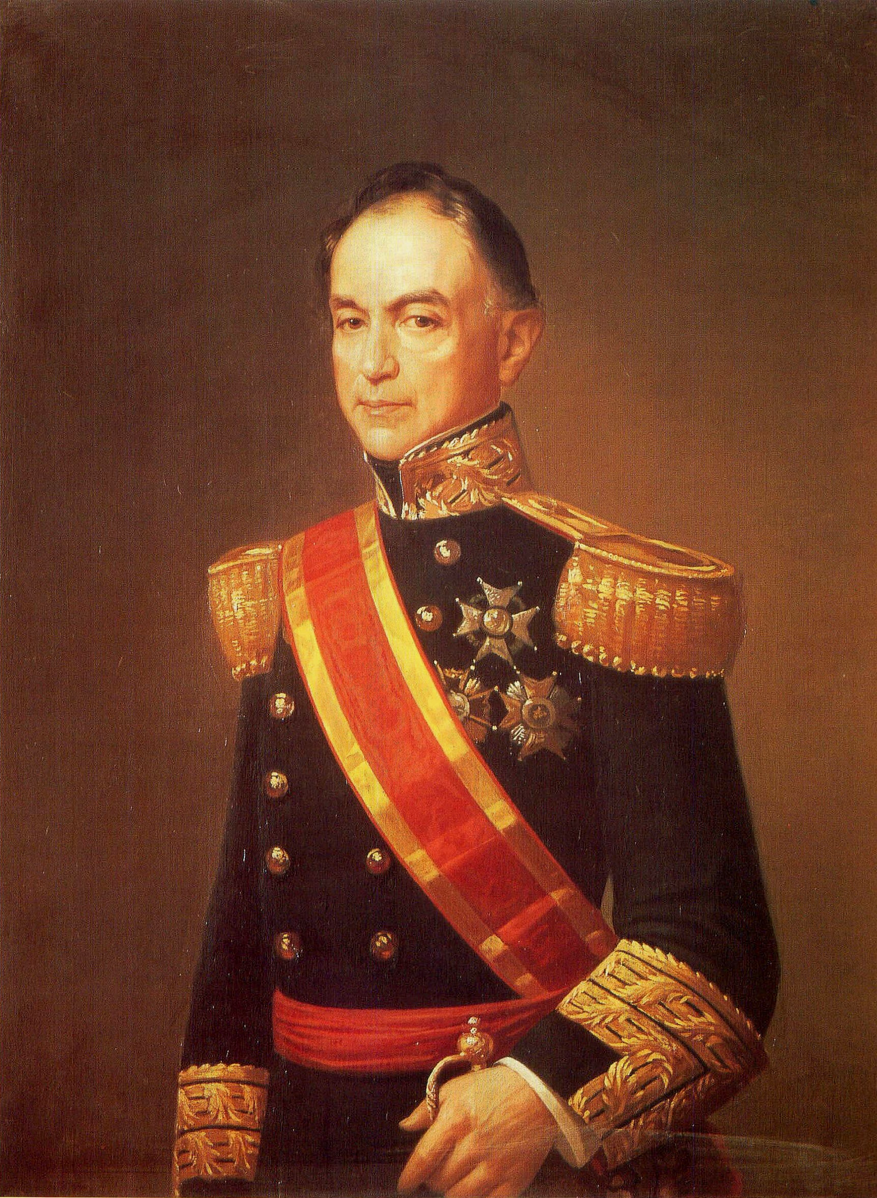 Retrato del militar y político español Joaquín Ezpeleta Enrile (1788-1863), que llegó a ser ministro de la Guerra y de Marina durante el reinado de Isabel II de España y también presidente del Senado y capitán general de Cuba.